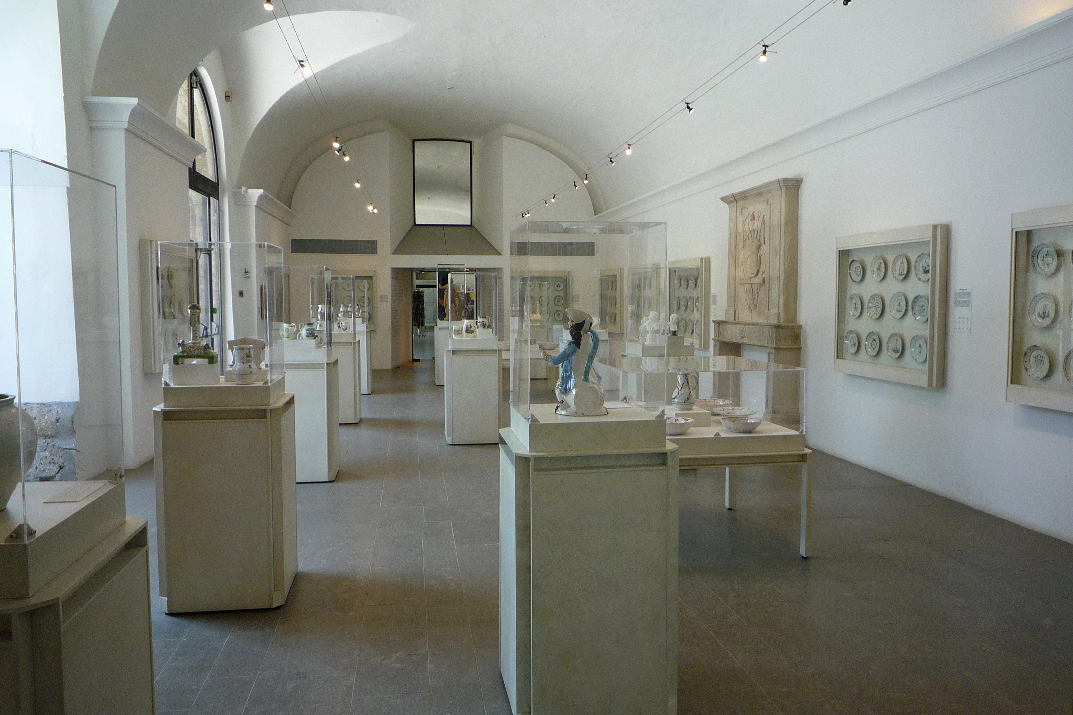 Salle des faïences, Musée de la Révolution française, Vizille (Isère).